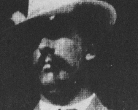 El general Jose Ines Salazar